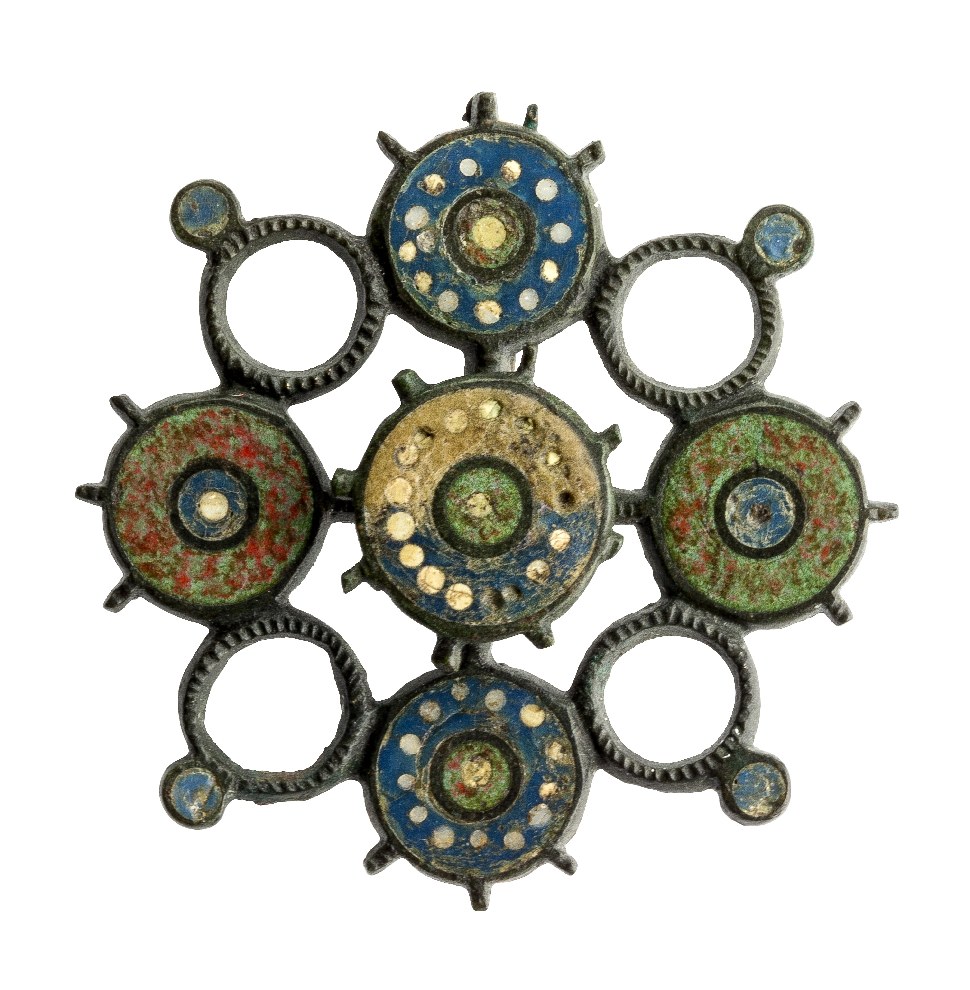 Schijffibula in geëmailleerd brons, 150 tot 225 NC, vindplaats: Tongeren, Kielenstraat, 2006, werkput 1, vlak 3, mogelijk uit graf 2, collectie Gallo-Romeins Museum Tongeren, GRM 9391